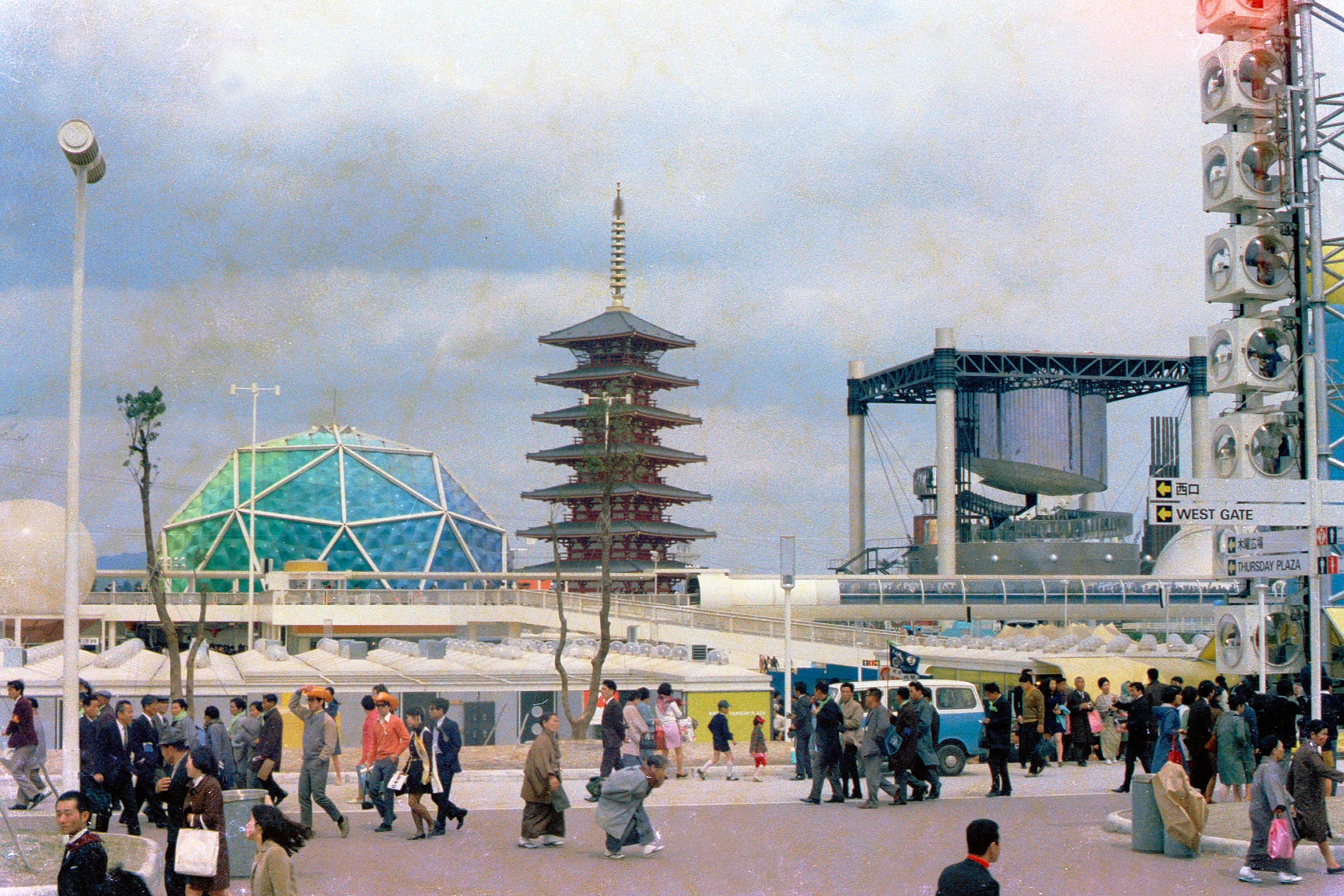 Furukawa Pavilion, Osaka Expo'70. April 1970.